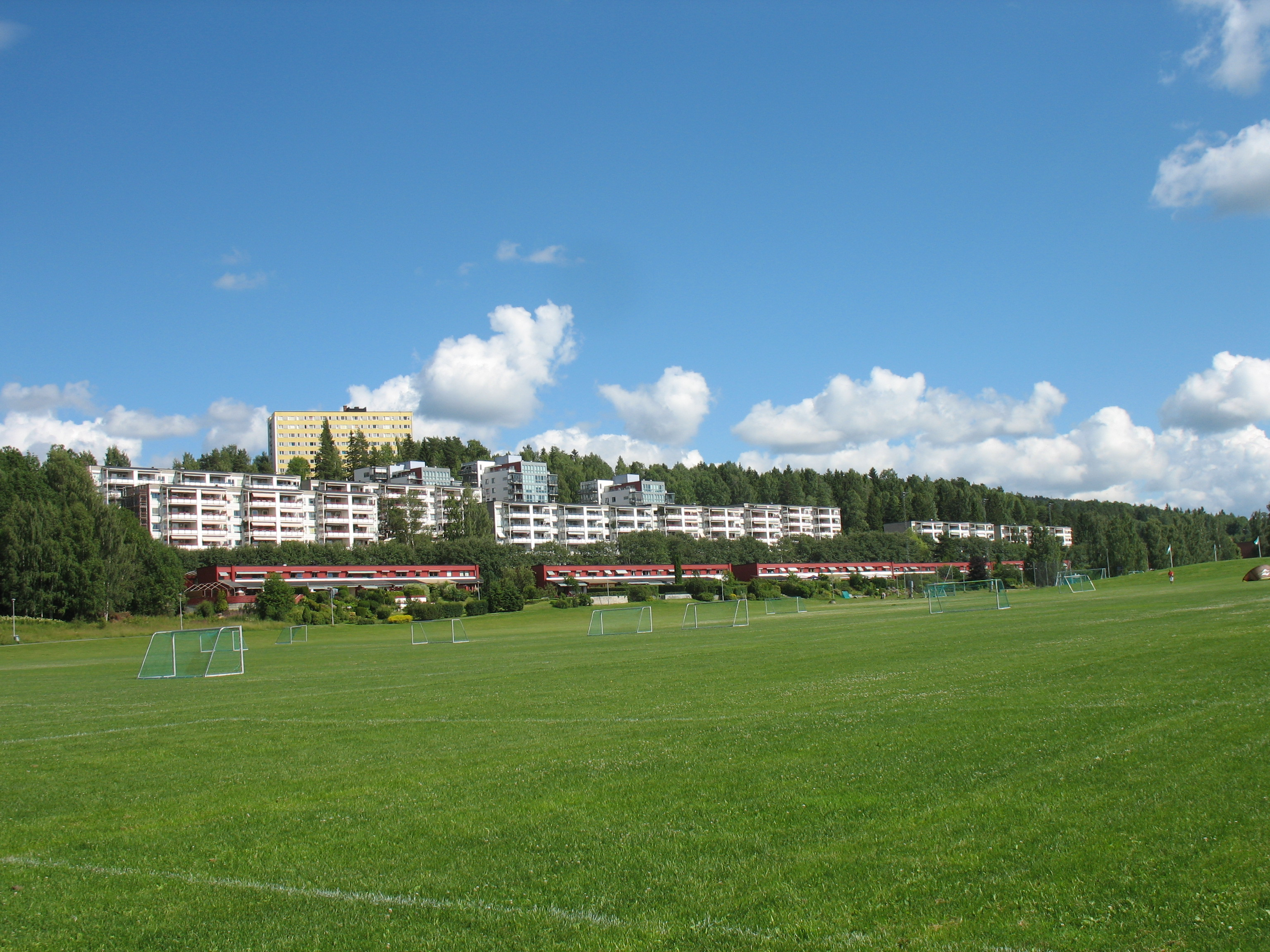 Rustadfeltet i Bydel Østensjø i Oslo. Her holder Rustad IL til, samtidig som feltet brukes under Norway Cup. I bakgrunnen er bebyggelsen i Paal Bergs vei på Bogerud.